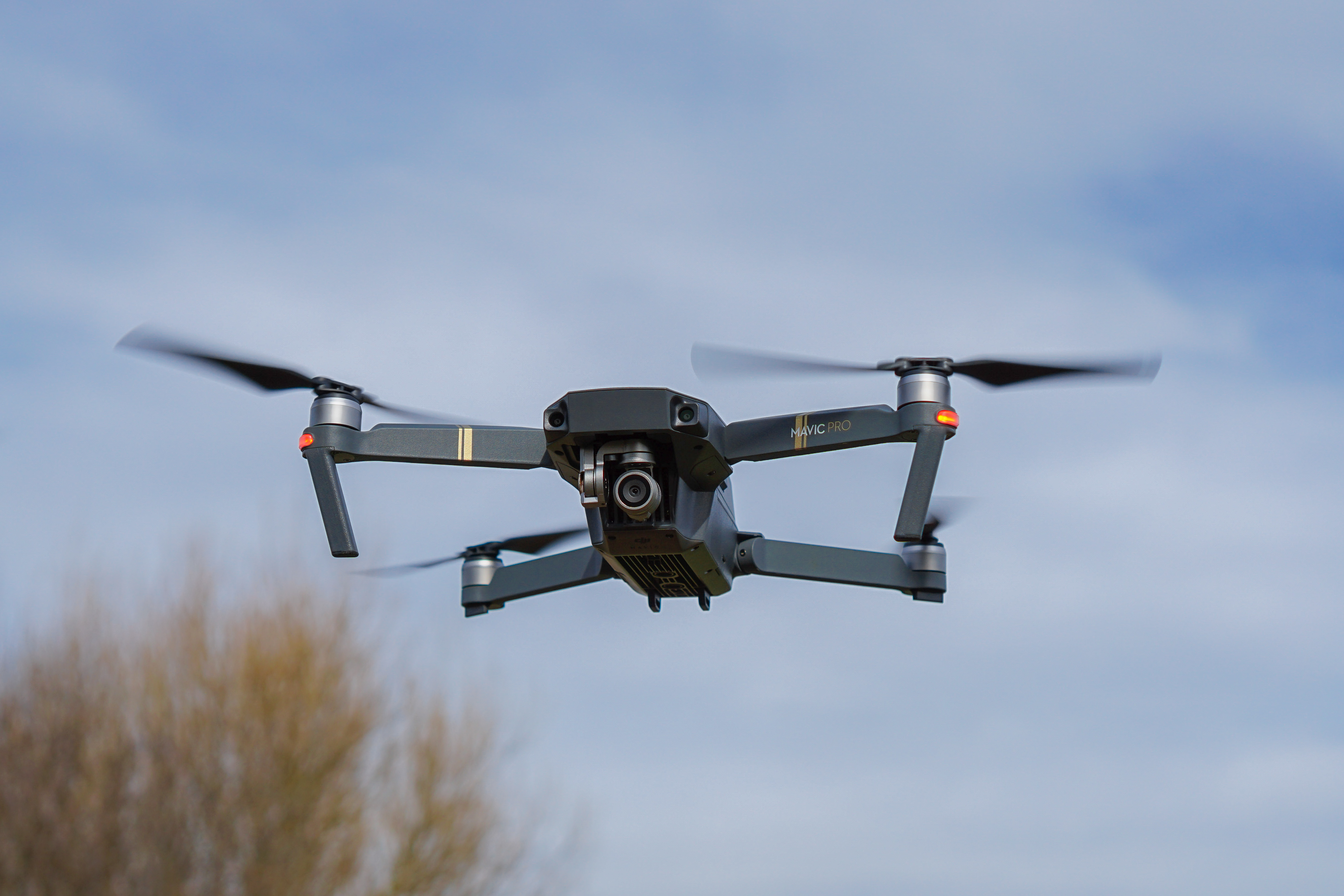 Quadcopter DJI Mavic Pro im Flug